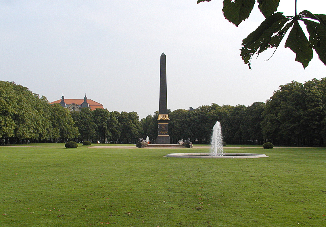 Der Löwenwall mit Obelisk und Springbrunnen